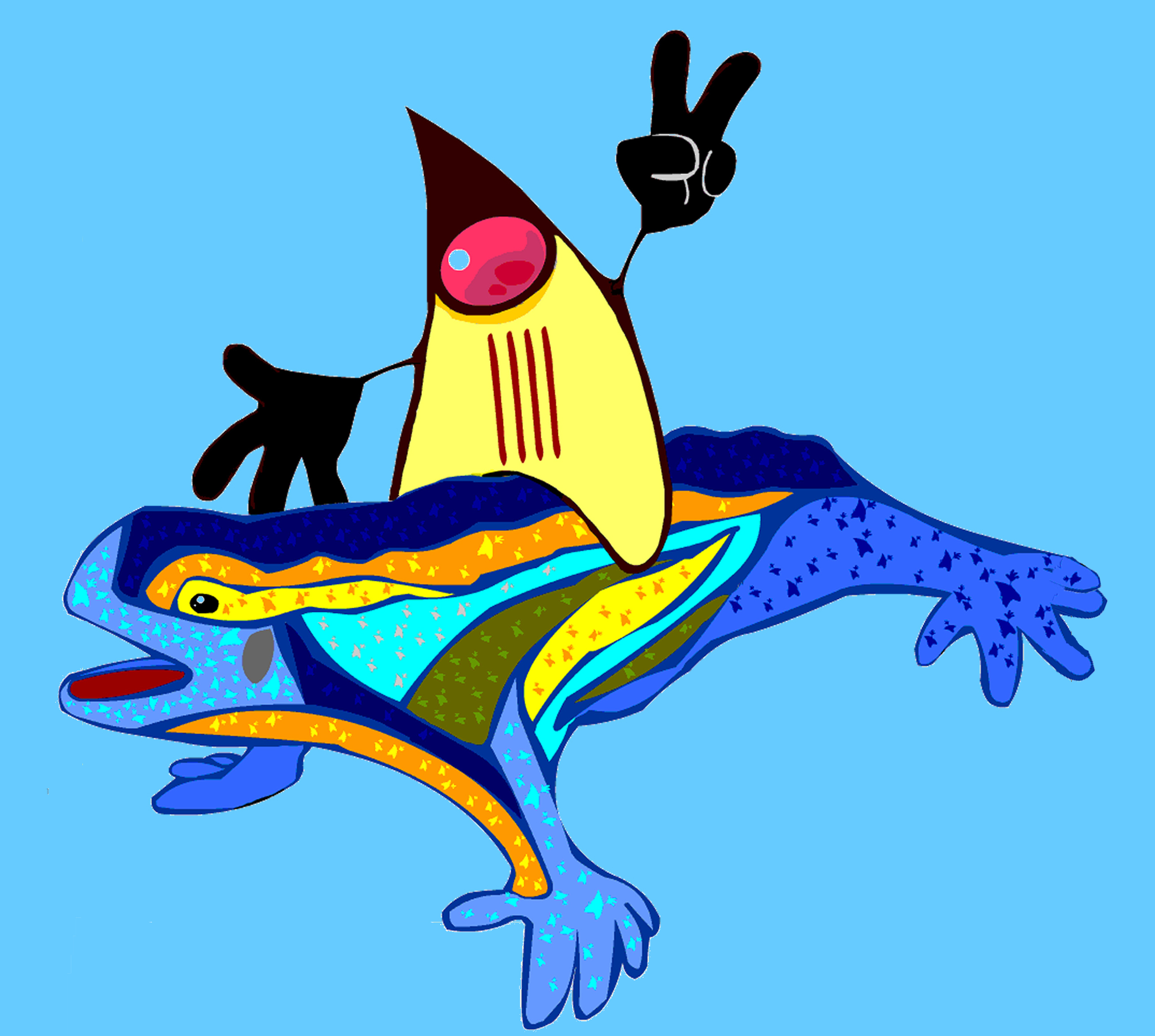 Logo del cartell de les 2ones Jornades Java Catalanes